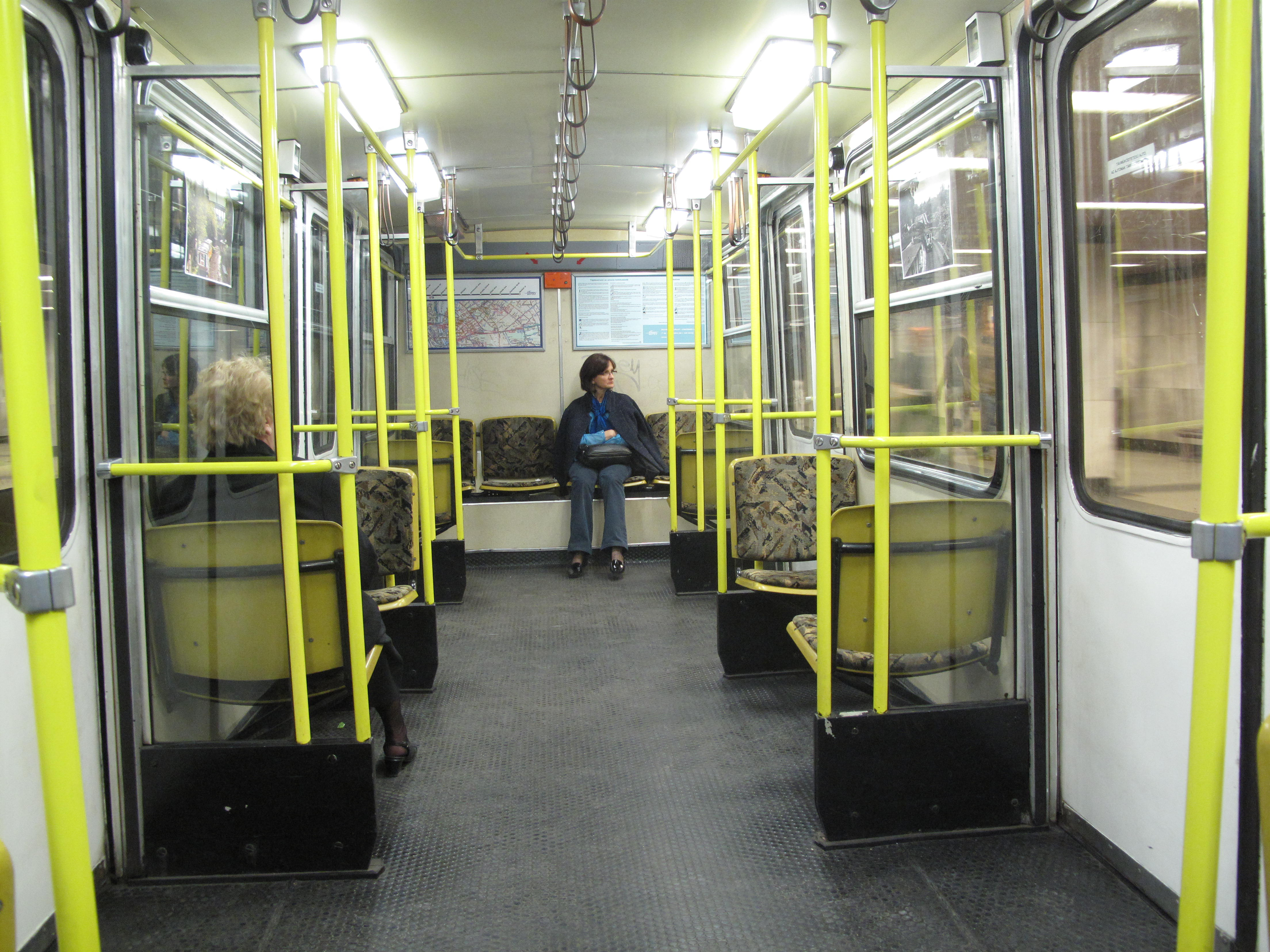 Budapešť